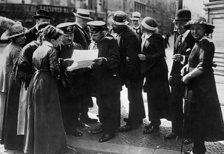 Berlin, Extrablatt Scherl Bilderdienst Aus den Mobilmachungstagen in Berlin, Moritzplatz 29059-34 [Berlin,- in den ersten Augusttagen 1914; Extrablatt wird mit Interesse gelesen.]